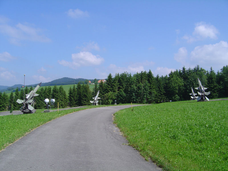 Werfergruppe Nord BL-64-ZG, Kt. Zug